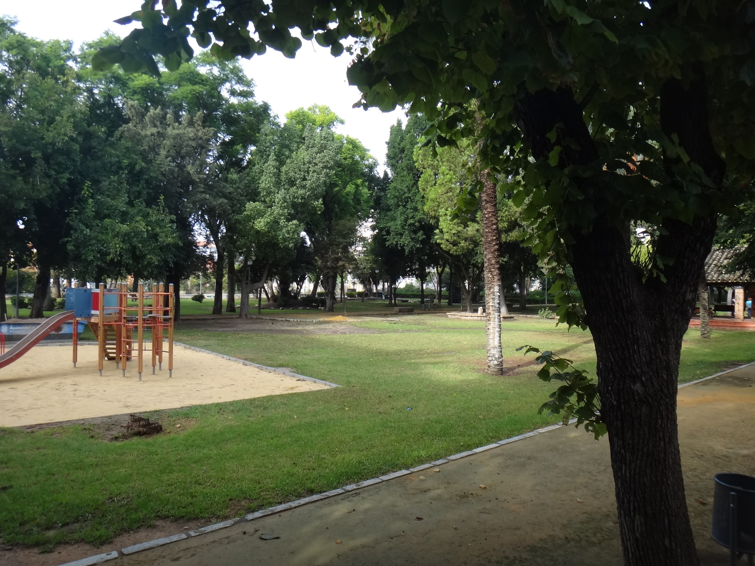 Parque Williams. Jerez de la Frontera (Andalucía, España)